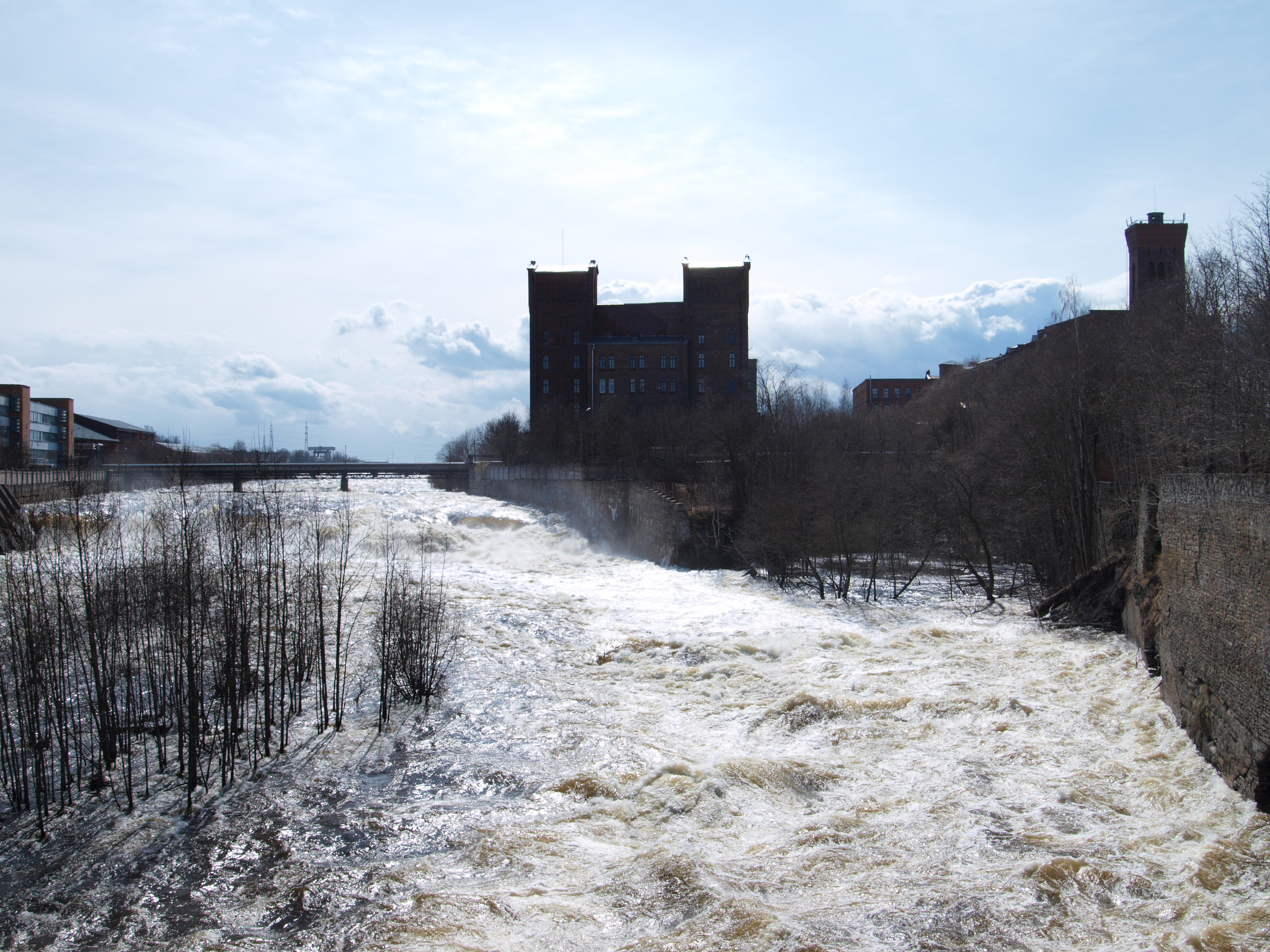 Narva jõgi suurvee ajal (aprill 2010).